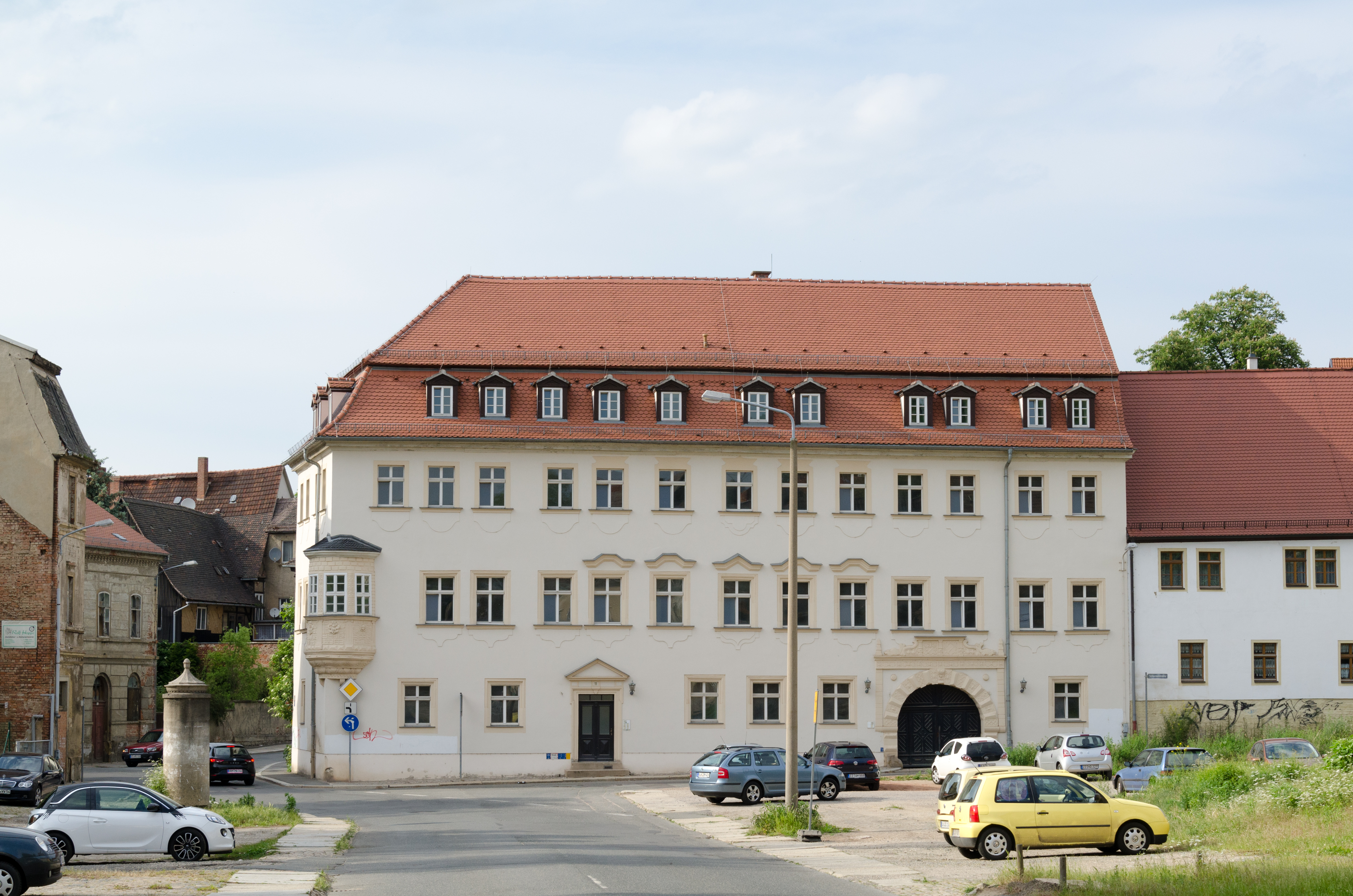 Zeitz, Brühl 11